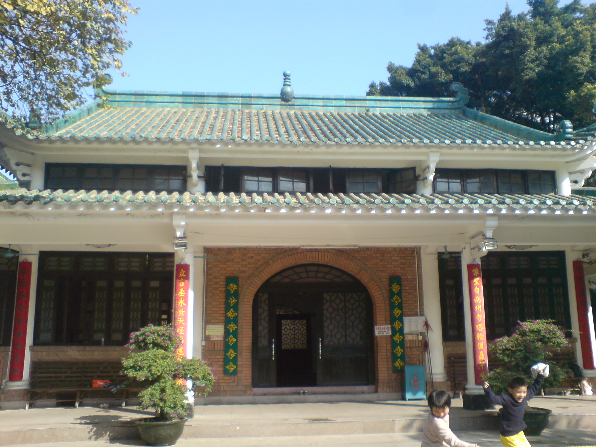 怀圣寺寺庙